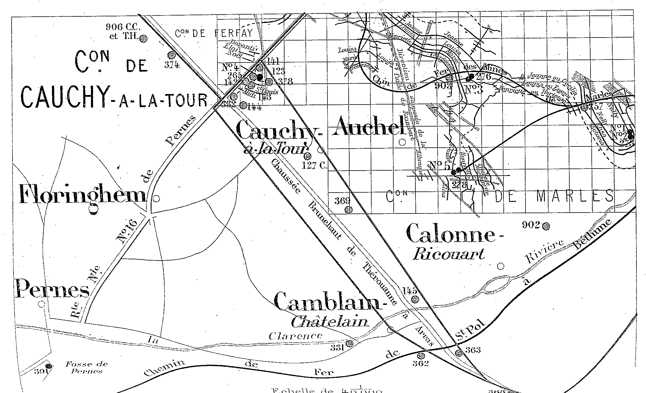 État des travaux de la Compagnie des mines de Cauchy-à-la-Tour vers 1880.